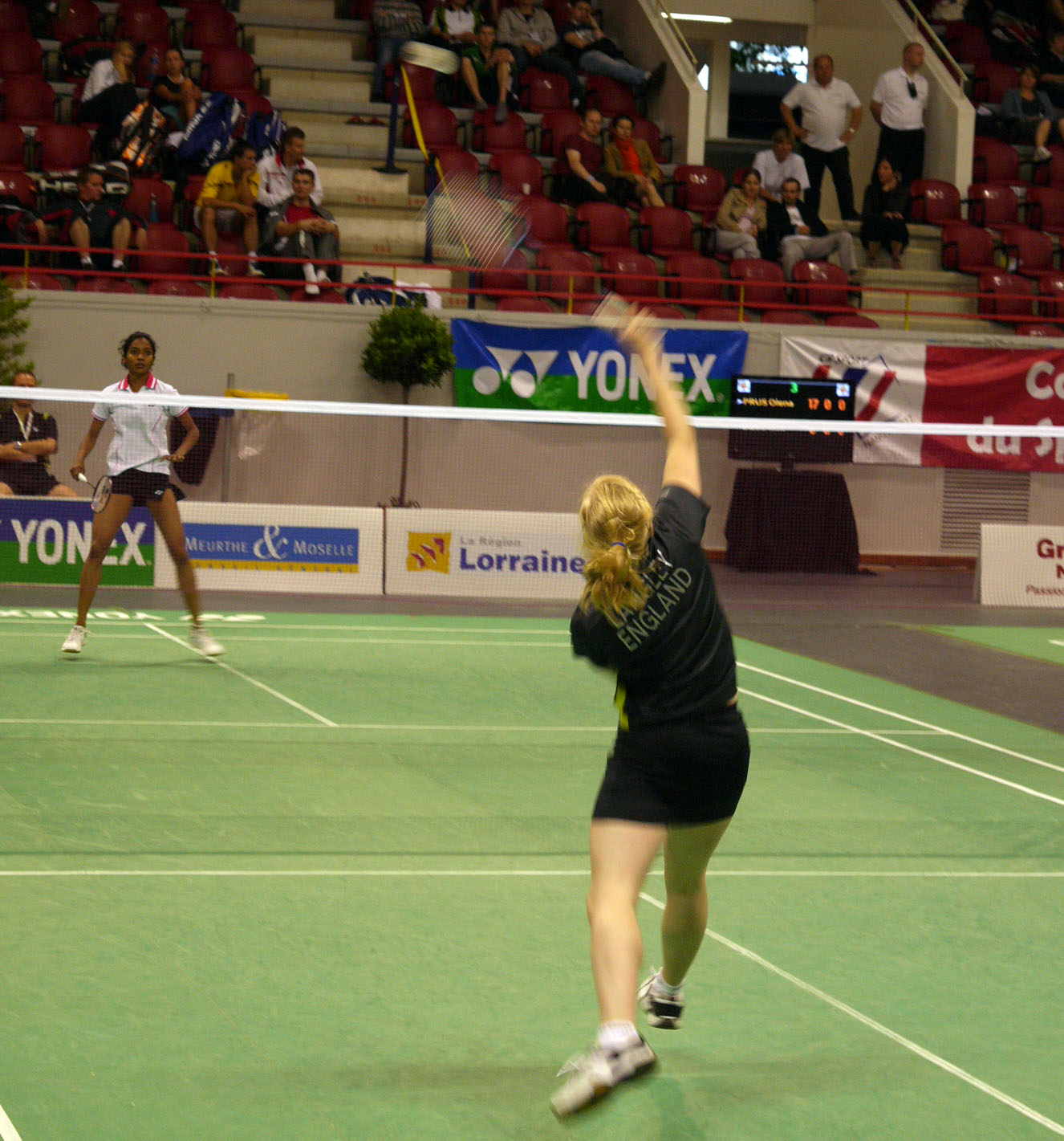 Vignes Waran